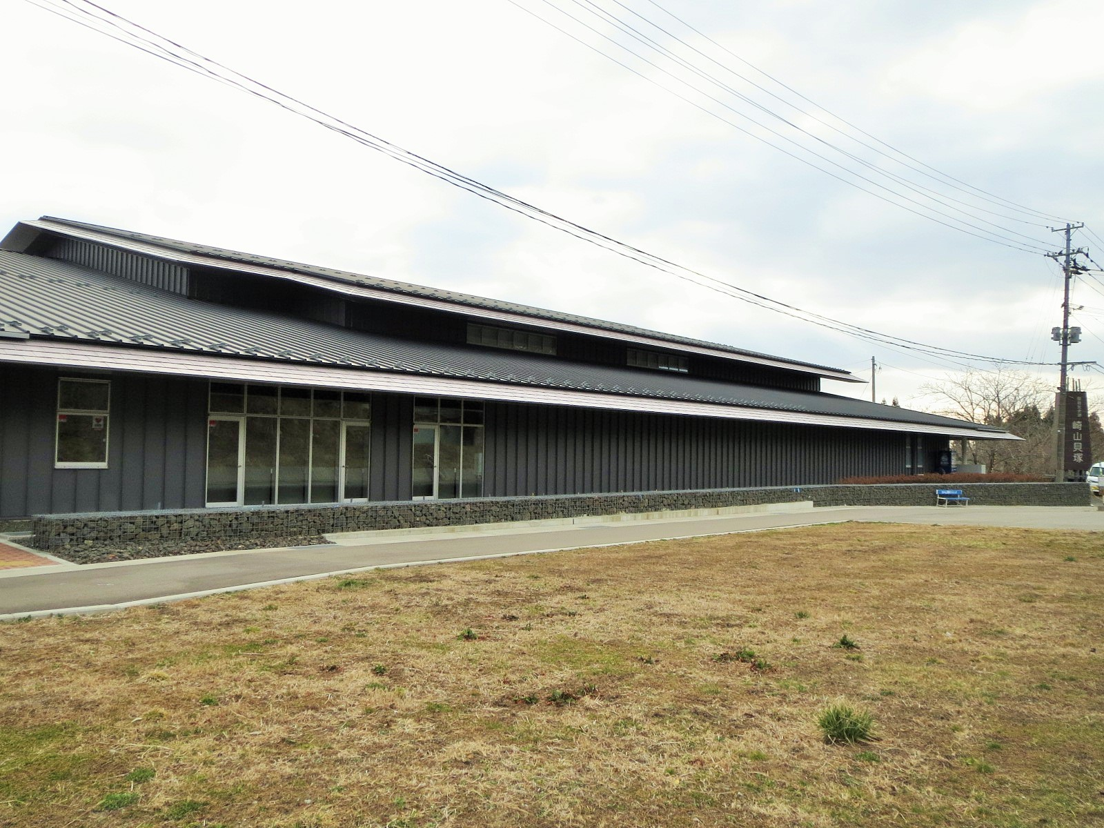 宮古市にある崎山貝塚博物館 Canon IXY 3